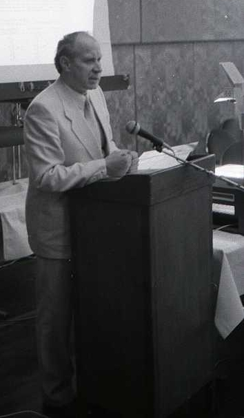 Dr. med. H. A. Massing während eines Vortrages.